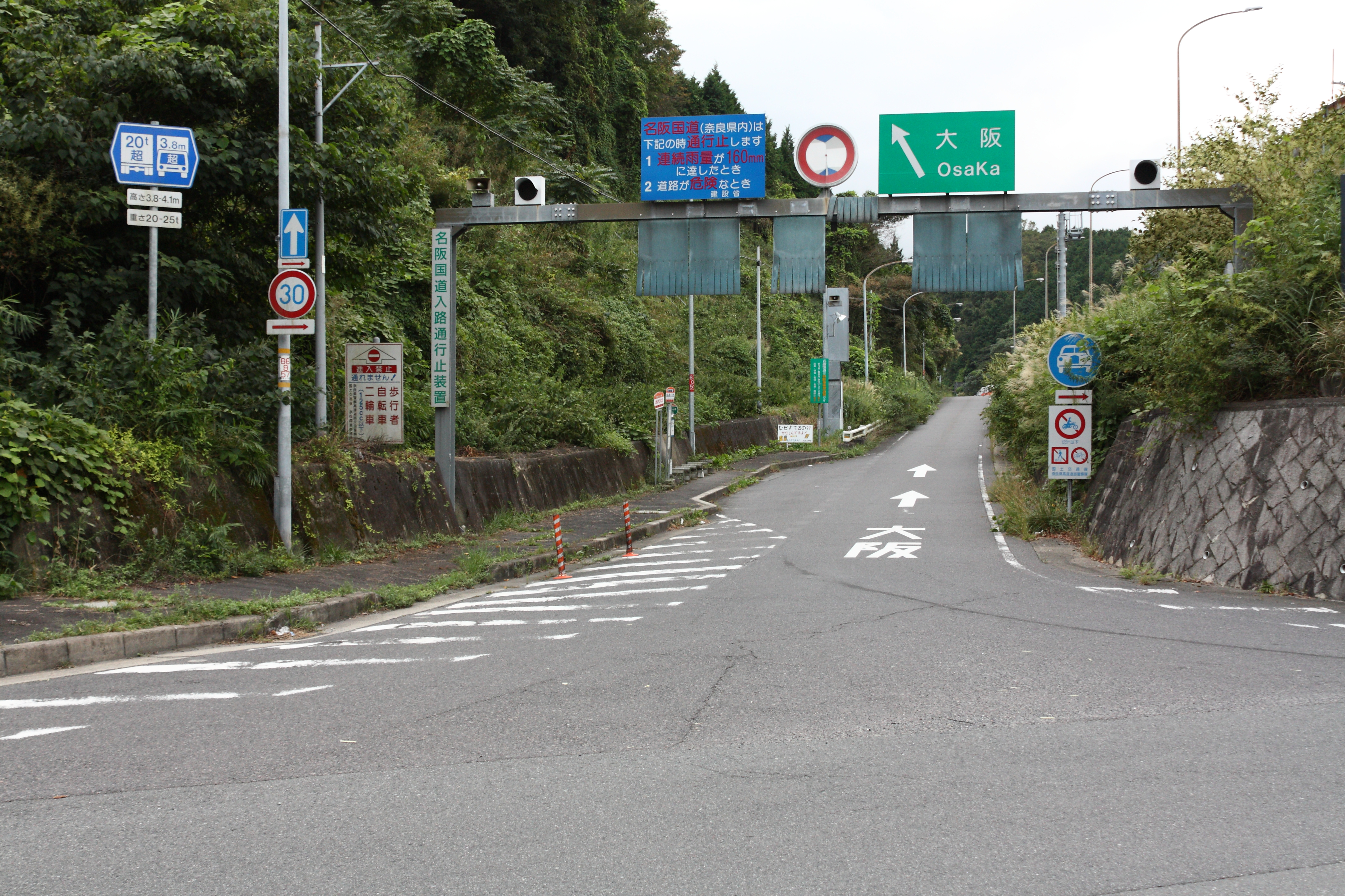 名阪国道 山添インターチェンジ（ダイヤモンド型） 天理方面入口 奈良県山辺郡山添村